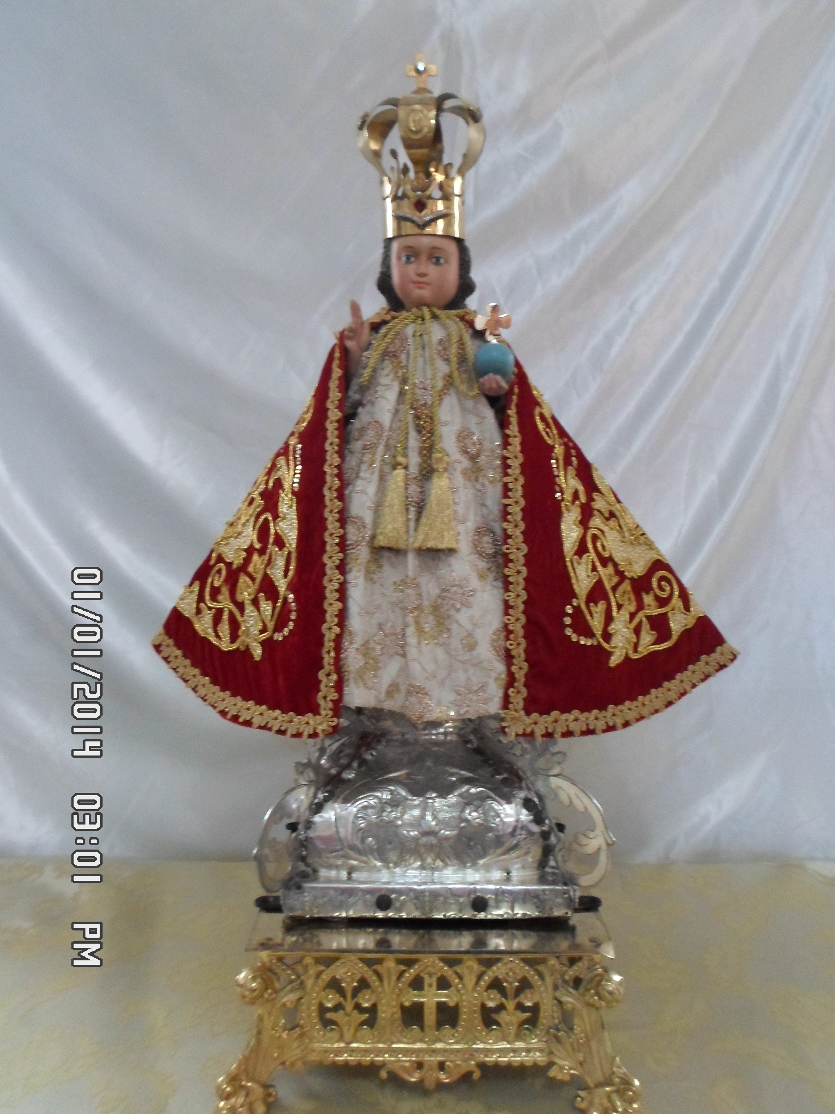 Santo patron de Escuque